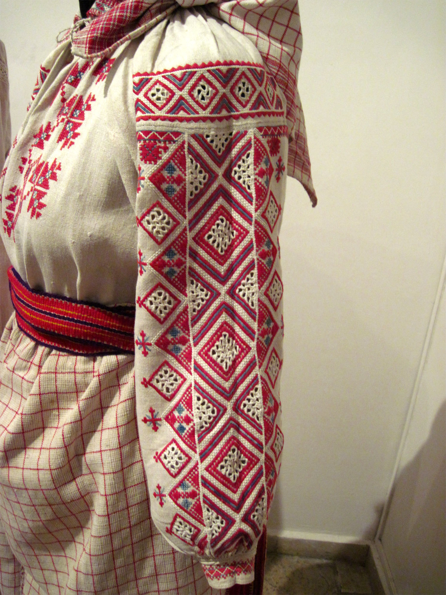 Вишита сорочка з Сарненського (або можливо Володимирецького) району Рівненської області Станом на 2012 р. перебувала у колекції І. Перевертнюка та В. Щибрі Фото з виставки в музеї Гончара (Київ)